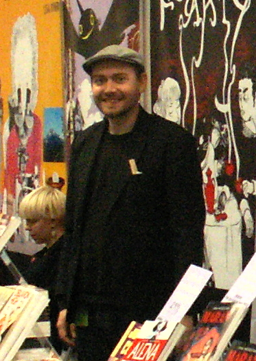 Fabian Göranson, förläggare (Kolik förlag), serieskapare och översättare. Fotograferad på Bokmässan 2012.